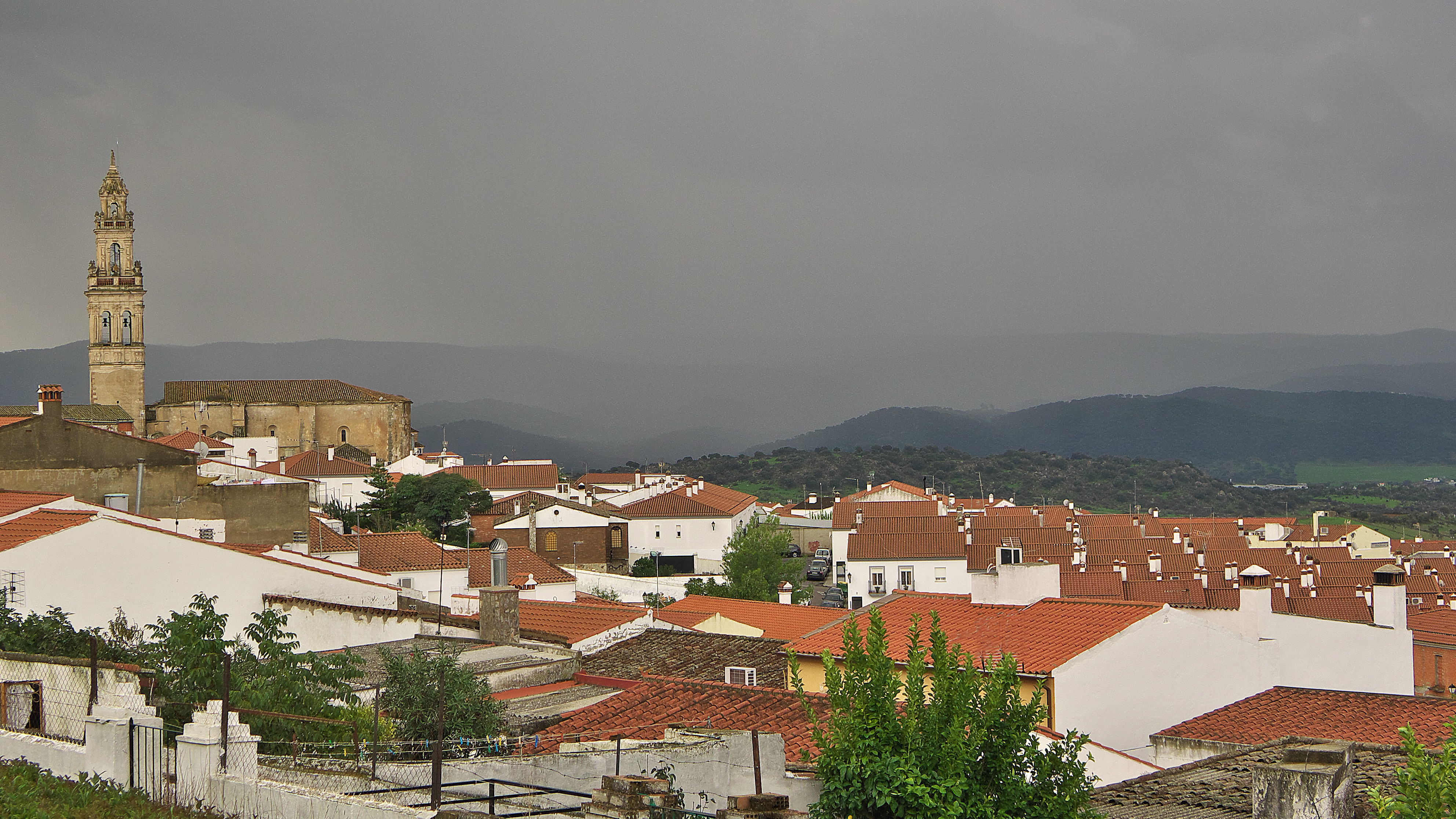 Vista de Jerez de los Caballeros y su Iglesia de Santa Catalina.